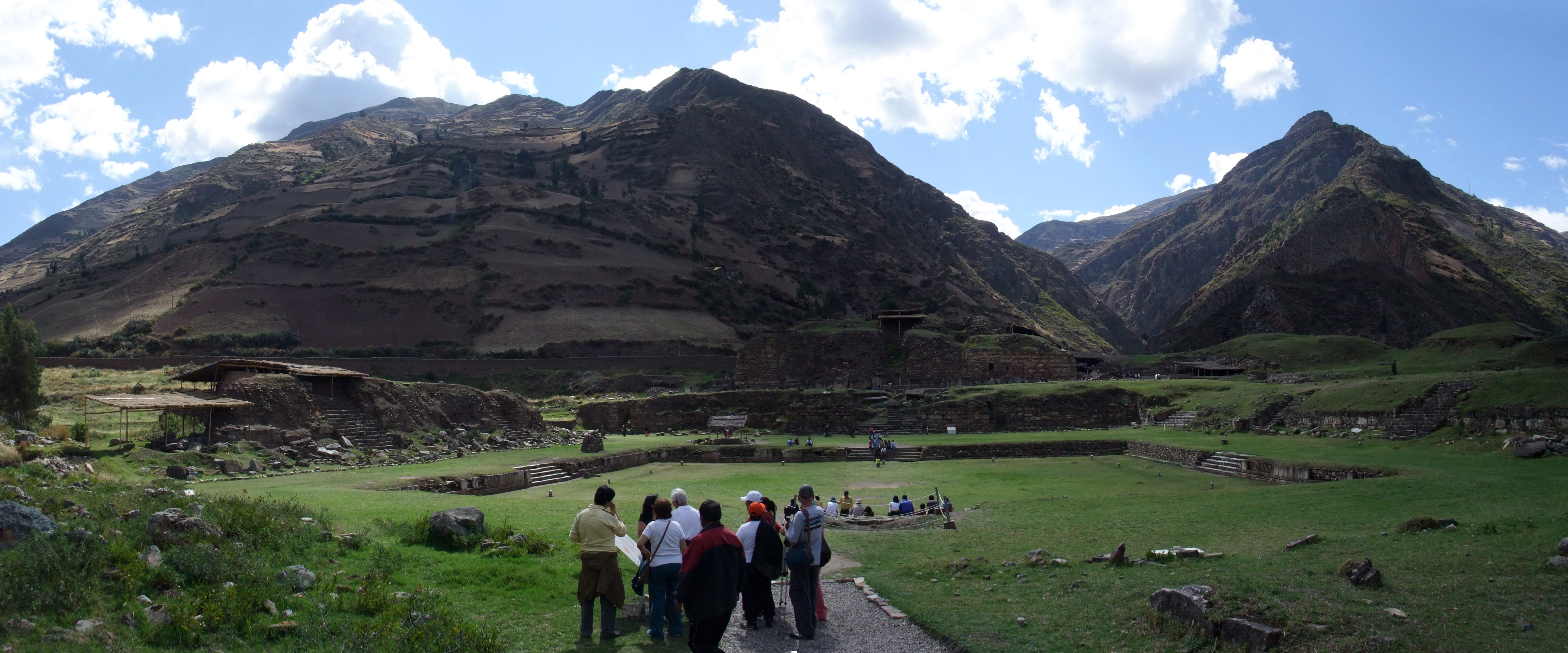 Photo globale du site de Chavín.